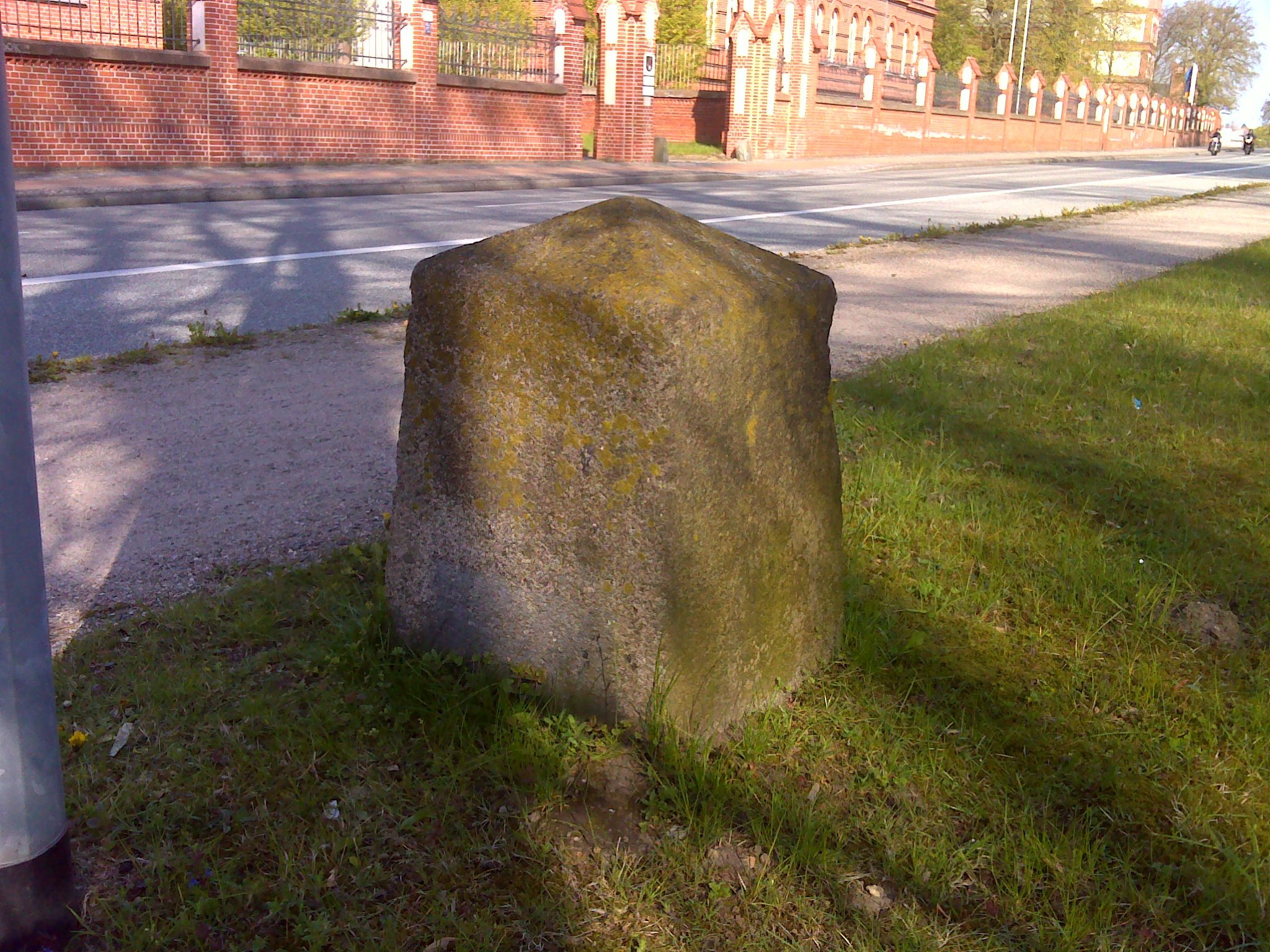 Mecklenburg-Schweriner Halbmeilenstein in Schwerin, Johannes-Stelling-Straße